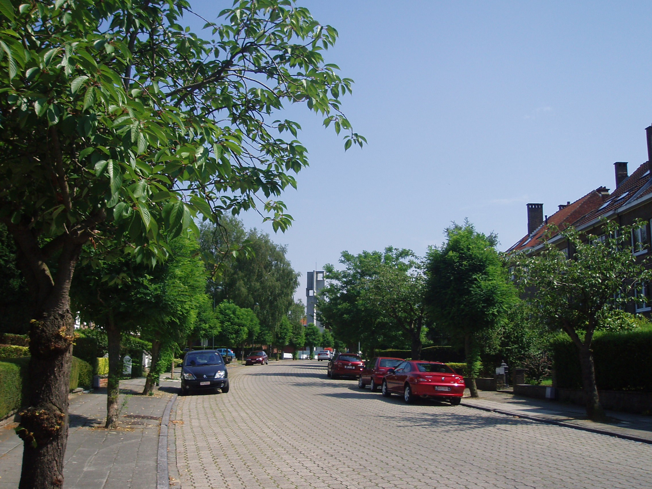 avenue des Héros Auderghem Belgium